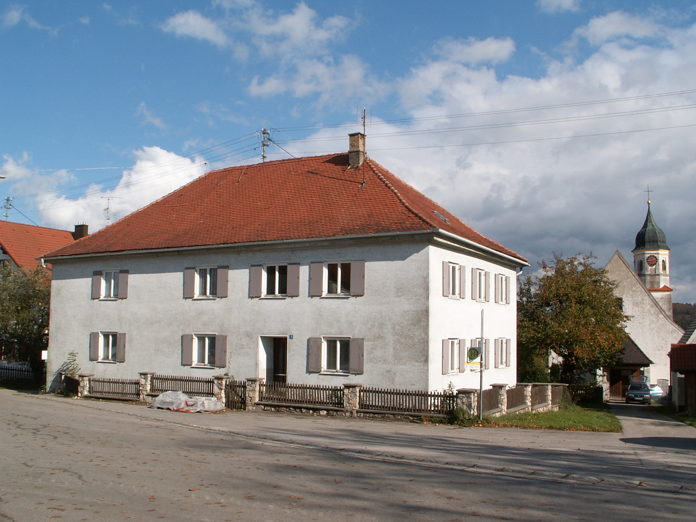 Pfarrhof Bayersried, Eggenthal